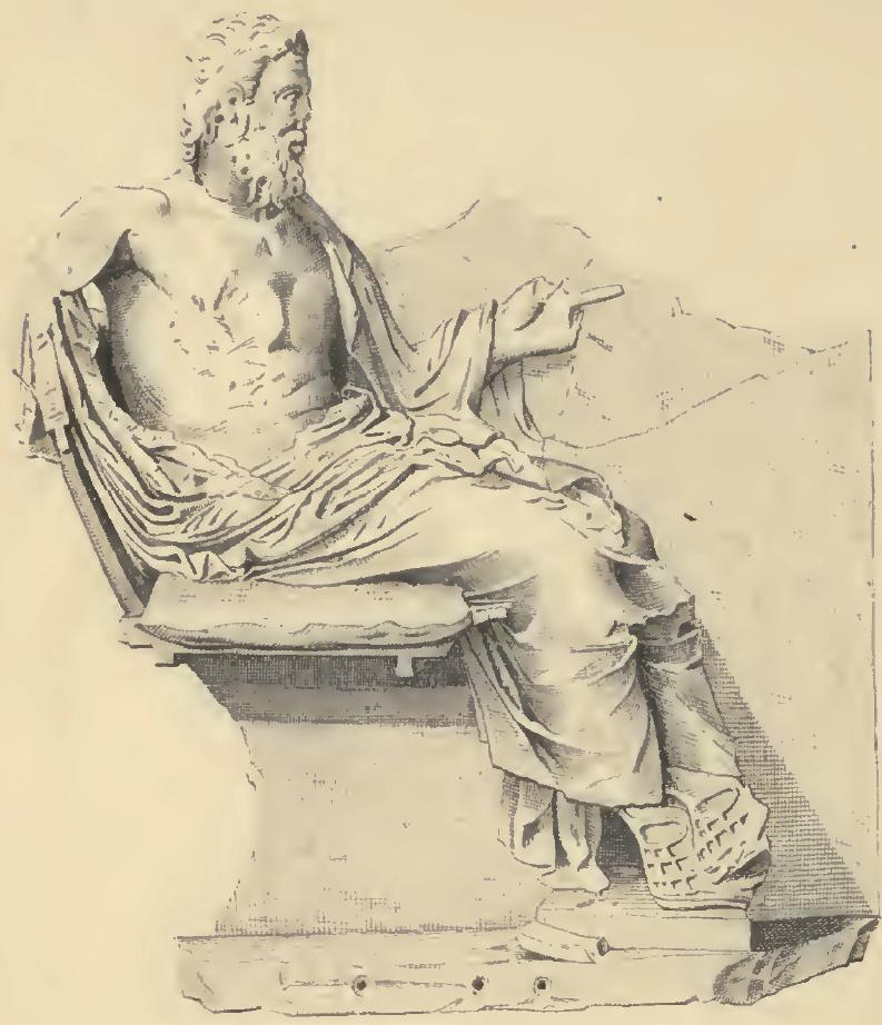 Relief des sitzenden Asklepios. Gefunden in Epidauros.